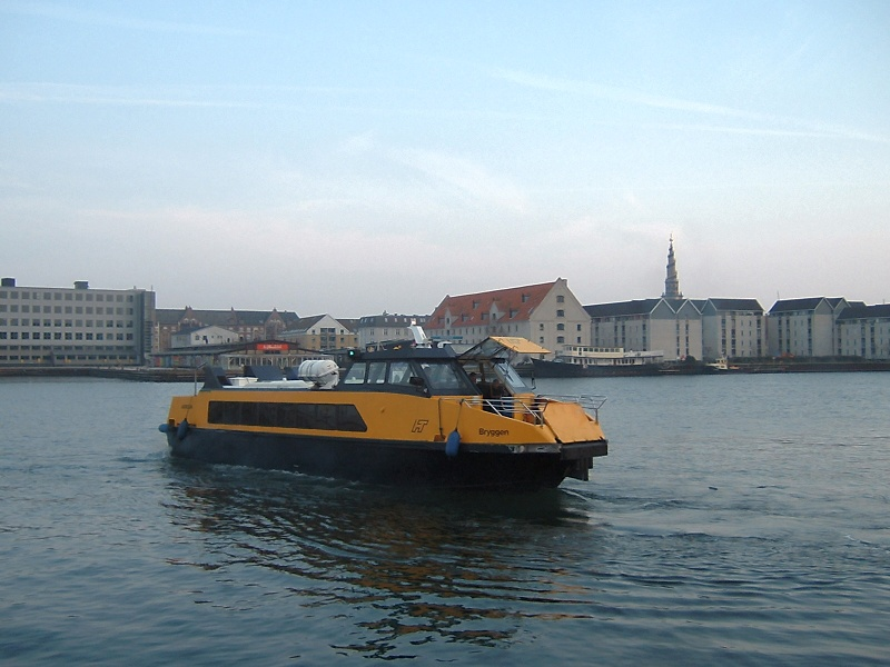 Copenhagen water taxi havnebus "Bryggen"